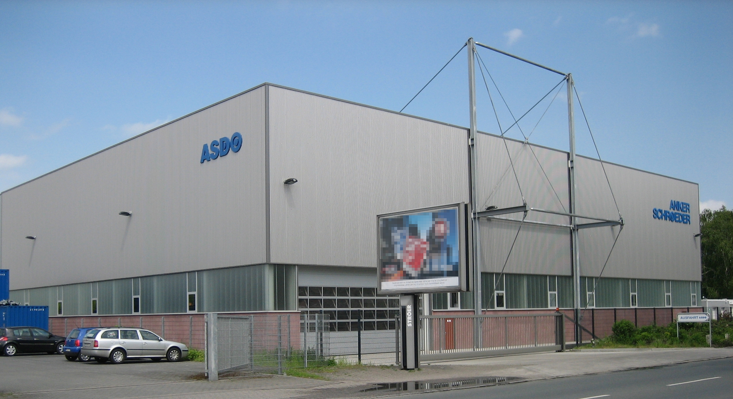 Das Unternehmen Anker Schröder in Dortmund